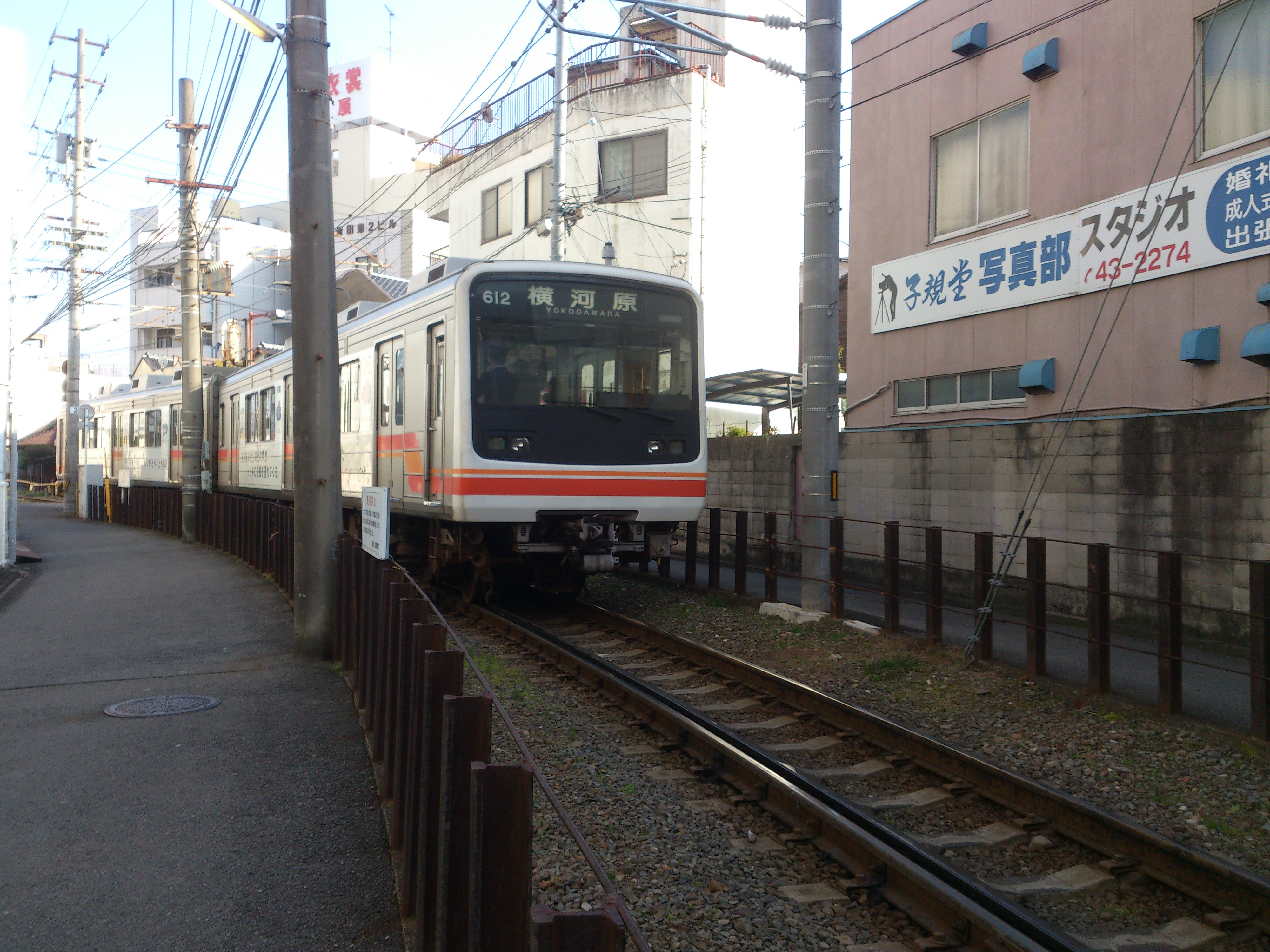 横河原線の電車です